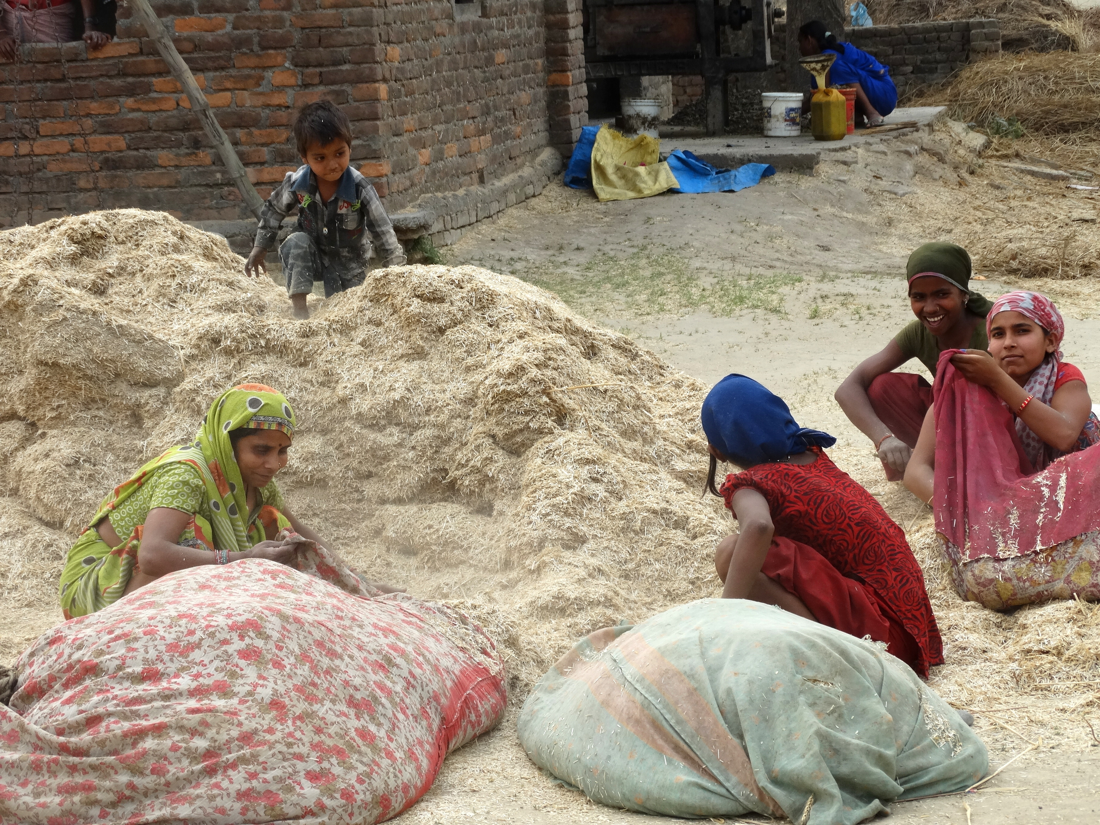 Packing Wheat - Outside Lumbini - Terai - Nepal